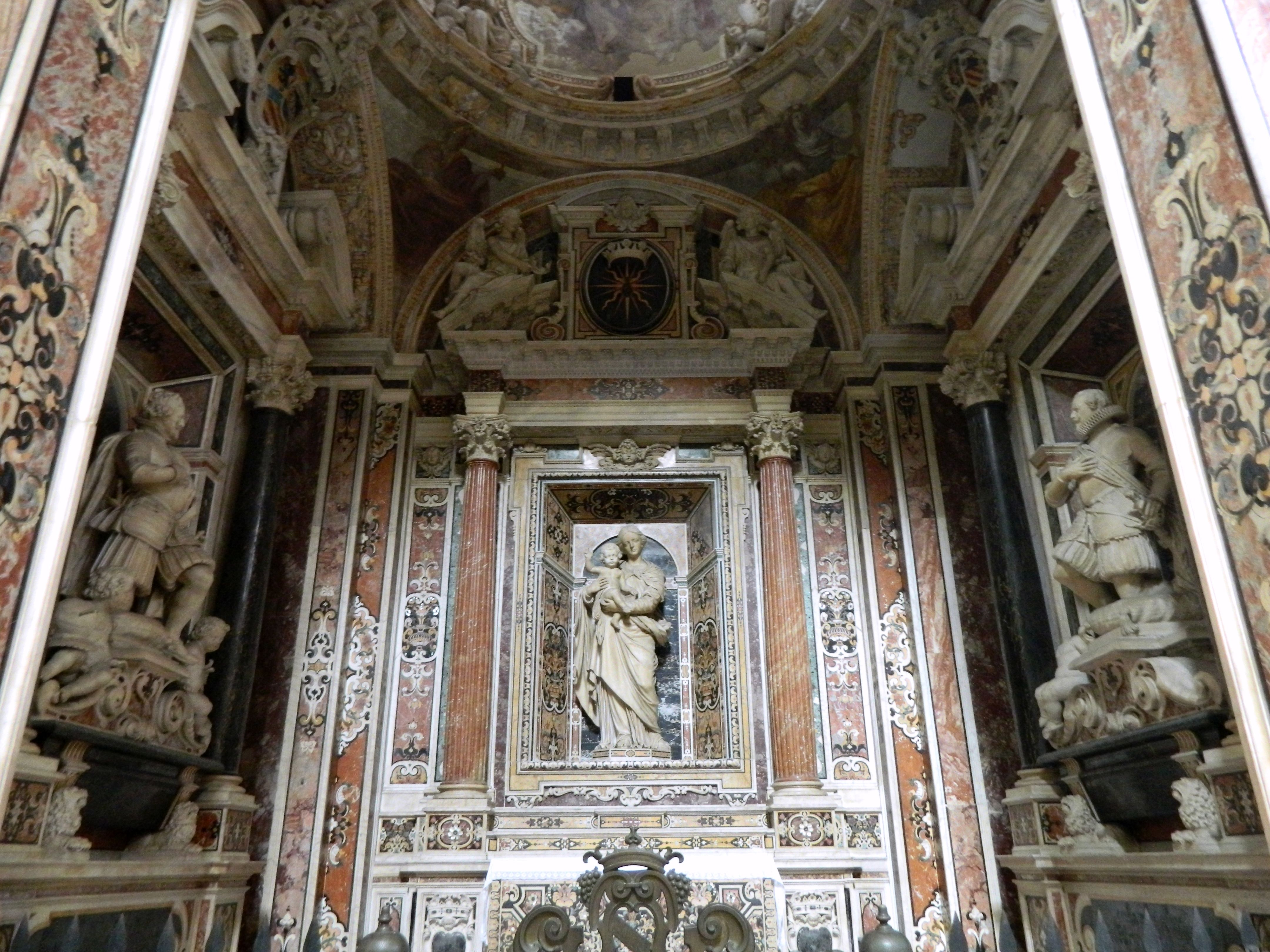 Basilica di San Paolo Maggiore (Napoli) - Cappella Firrao